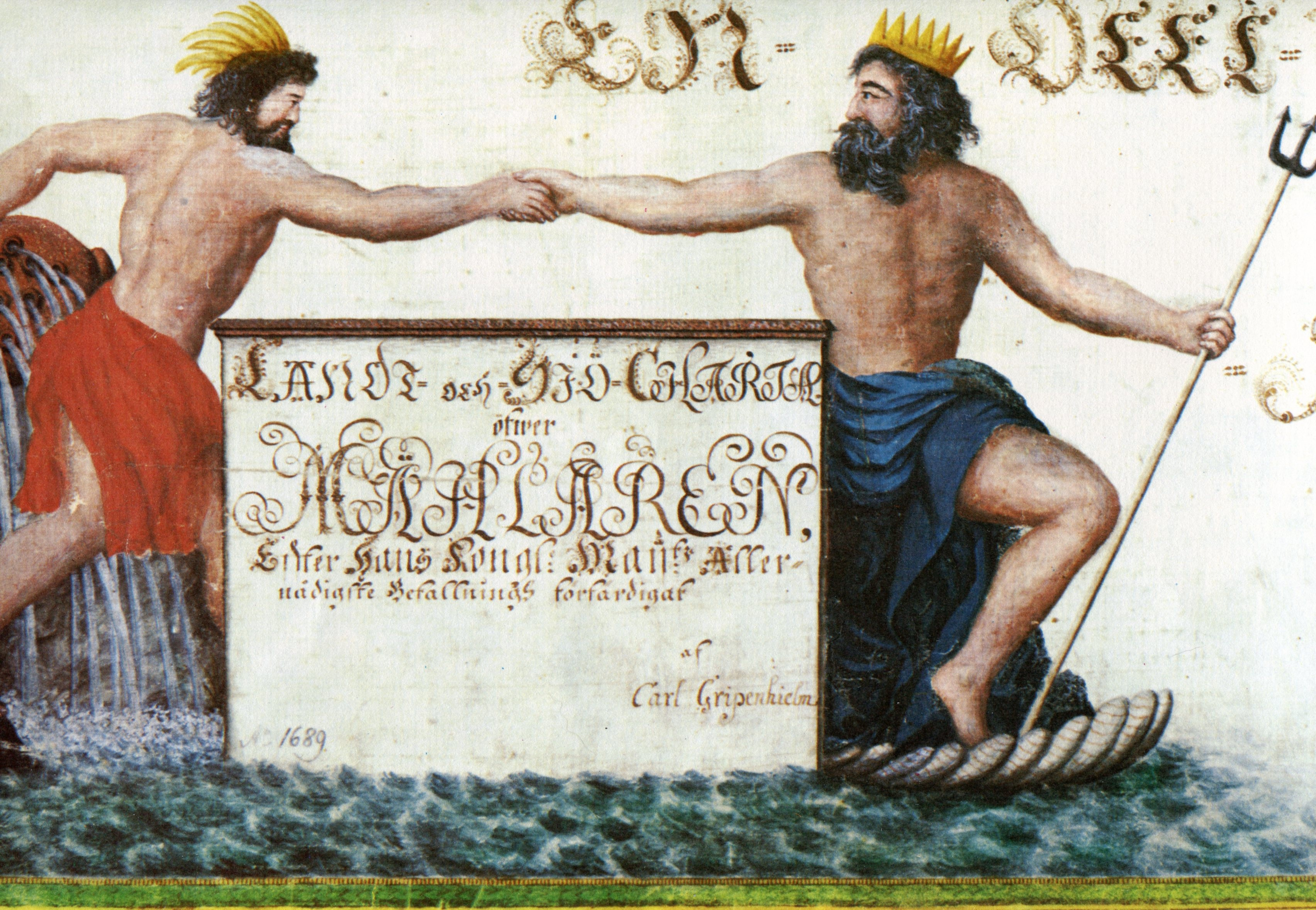 Del av Gripenhielms Mälarkarta från 1689 (mindre kopia från 1690)